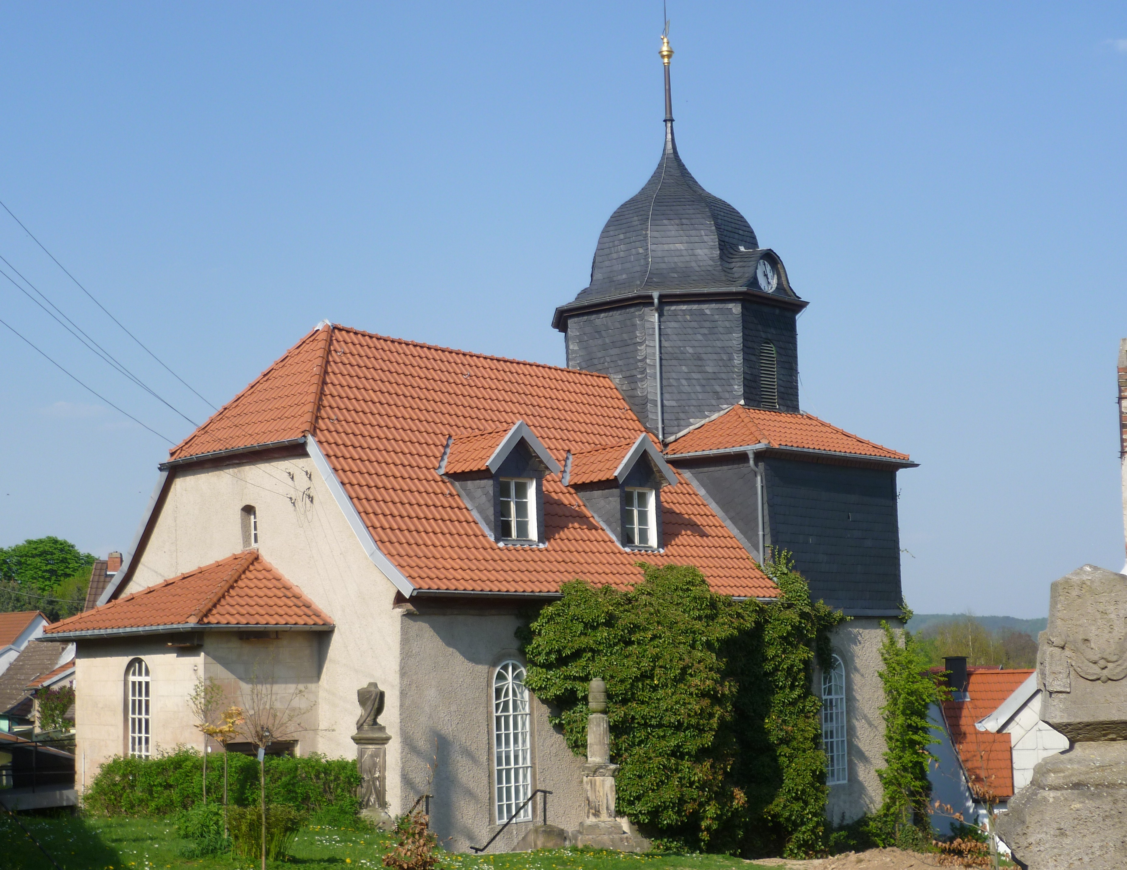 St.-Georg-Kirche im Stadtteil Bebra/Sondershausen-West (Thüringen)